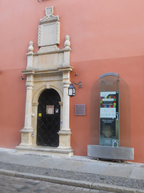 Poznań, ul. Wodna 27 - Pałac Górków, obecnie Muzeum Archeologiczne (wejście do Muzeum)